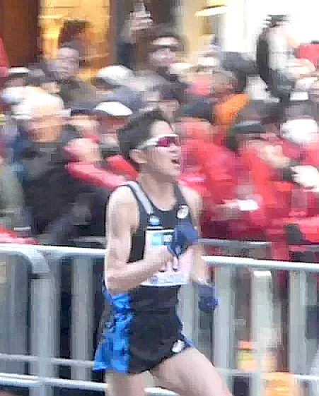 山本浩之 (Hiroki Yamamoto) (1986年生の陸上選手)